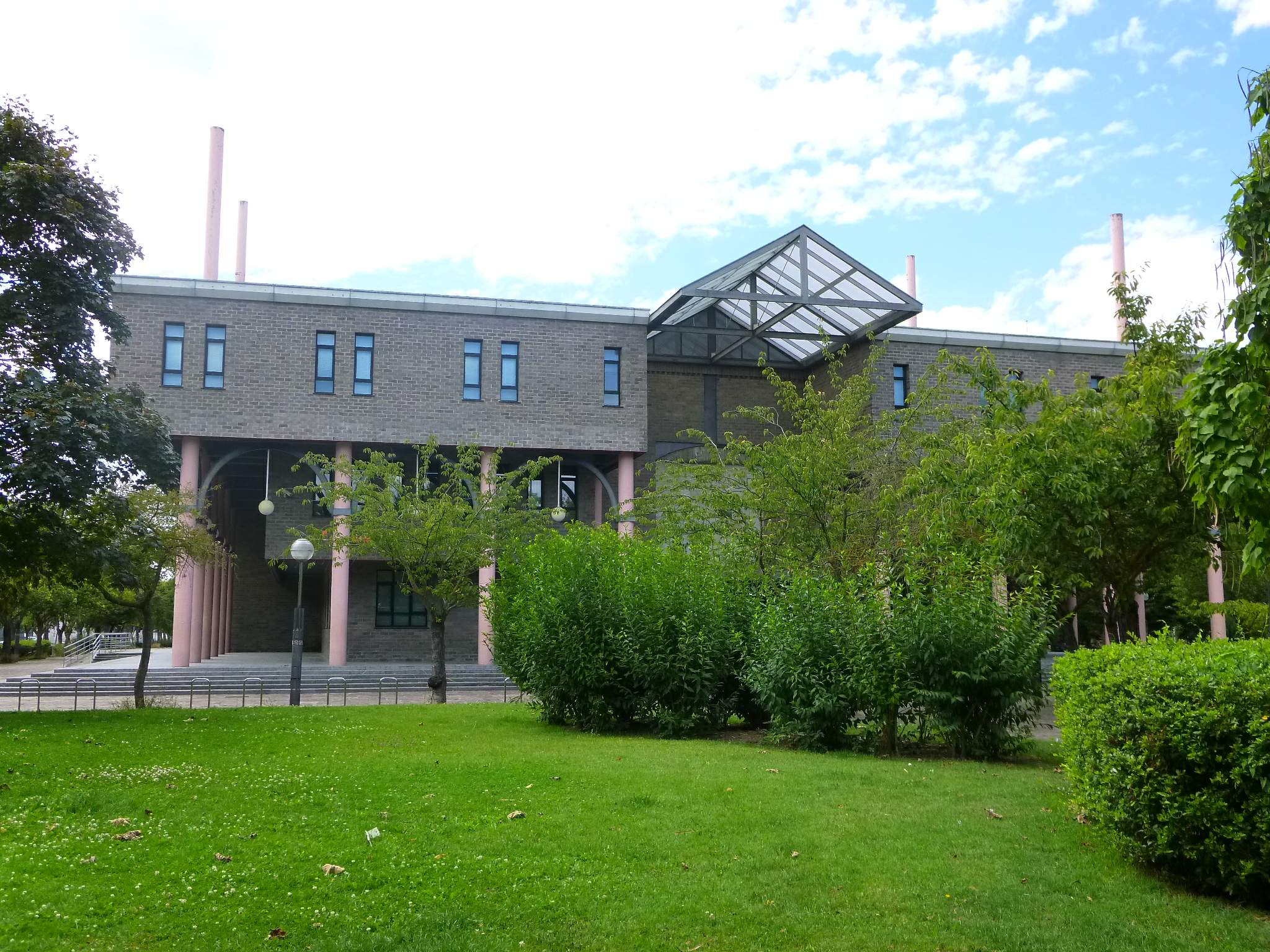 Conservatorio de Música Jesús Guridi (Vitoria)